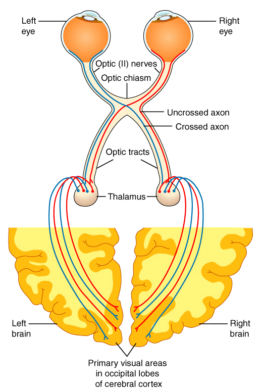 HVS